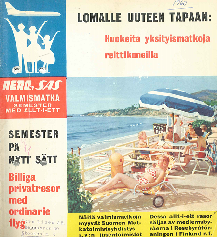 Valmismatkaesite